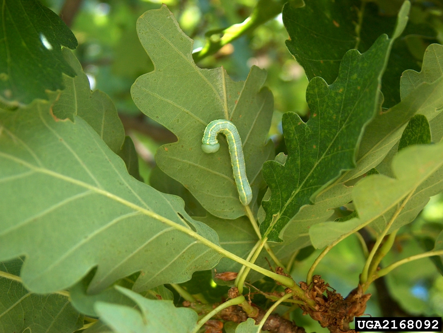 Drymonia ruficornis, larva.